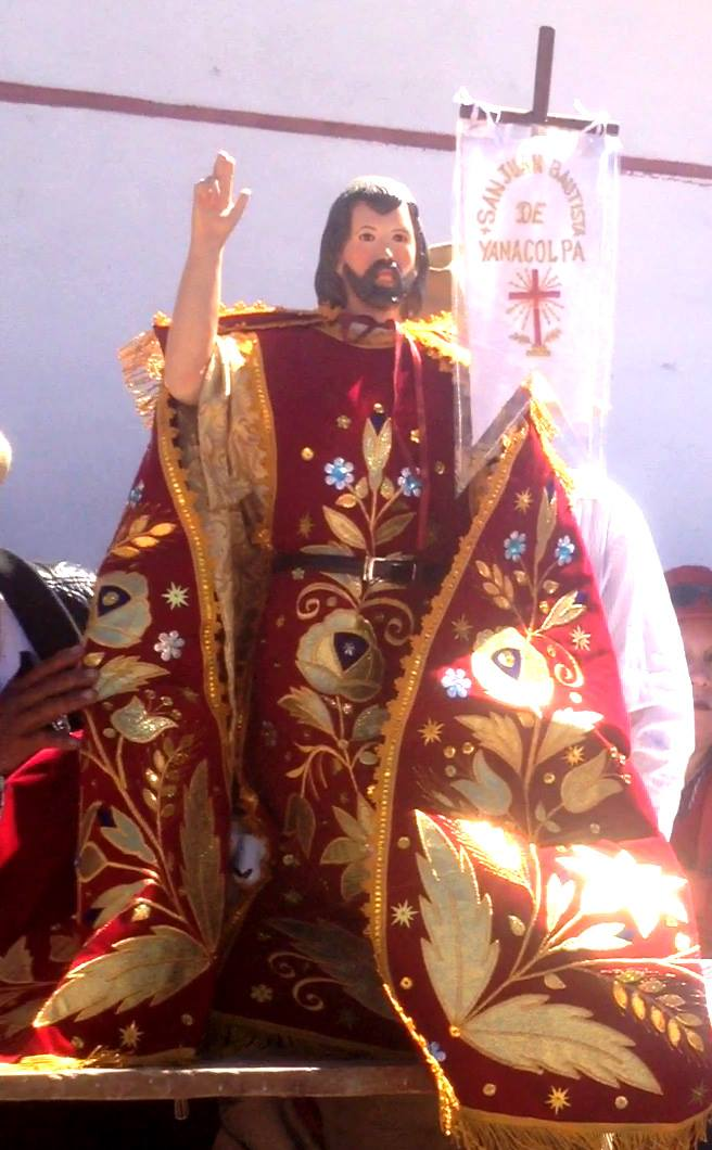 Foto de San Juan Bautista, es el patrono del Barrio Yanacolpa, su fiesta costumbrista se realiza el 02 de agosto, y el 24 de Junio se conmemora su fecha de nacimiento.